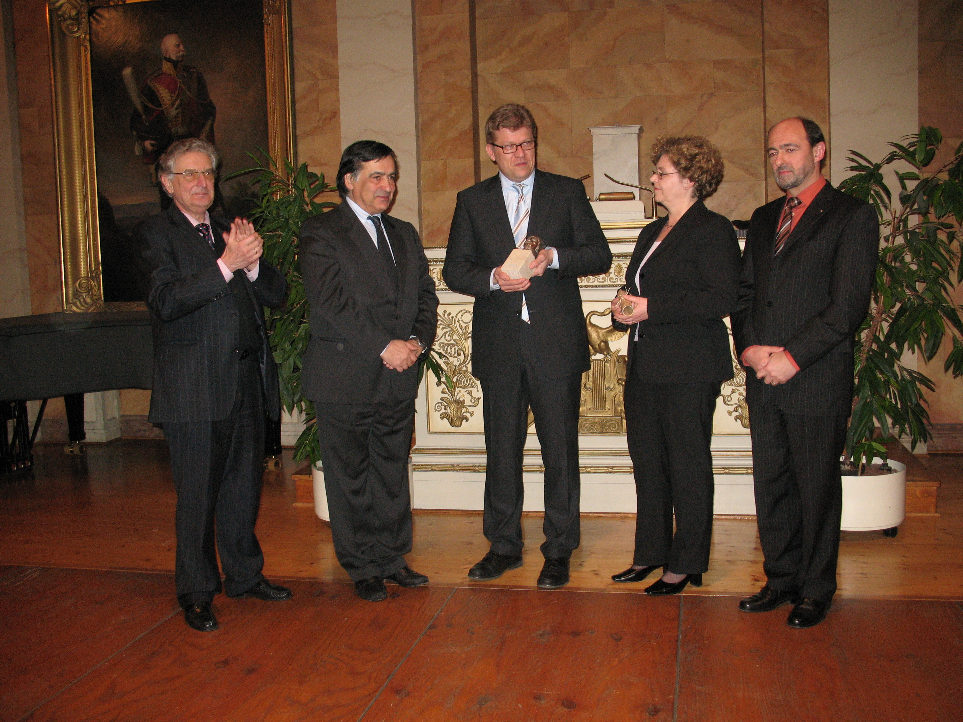 Von links: Gerhart Baum, Prof. Dr. Leoluca Orlando, Prof. Dr. Stefan Kipf und Heike Vollstedt bei der Verleihung des Humanismus-Preises an Prof. Dr. Leoluca Orlando im Rahmen des Bundeskongresses des DAV 2008 in der alten Aula der Universität Göttingen.